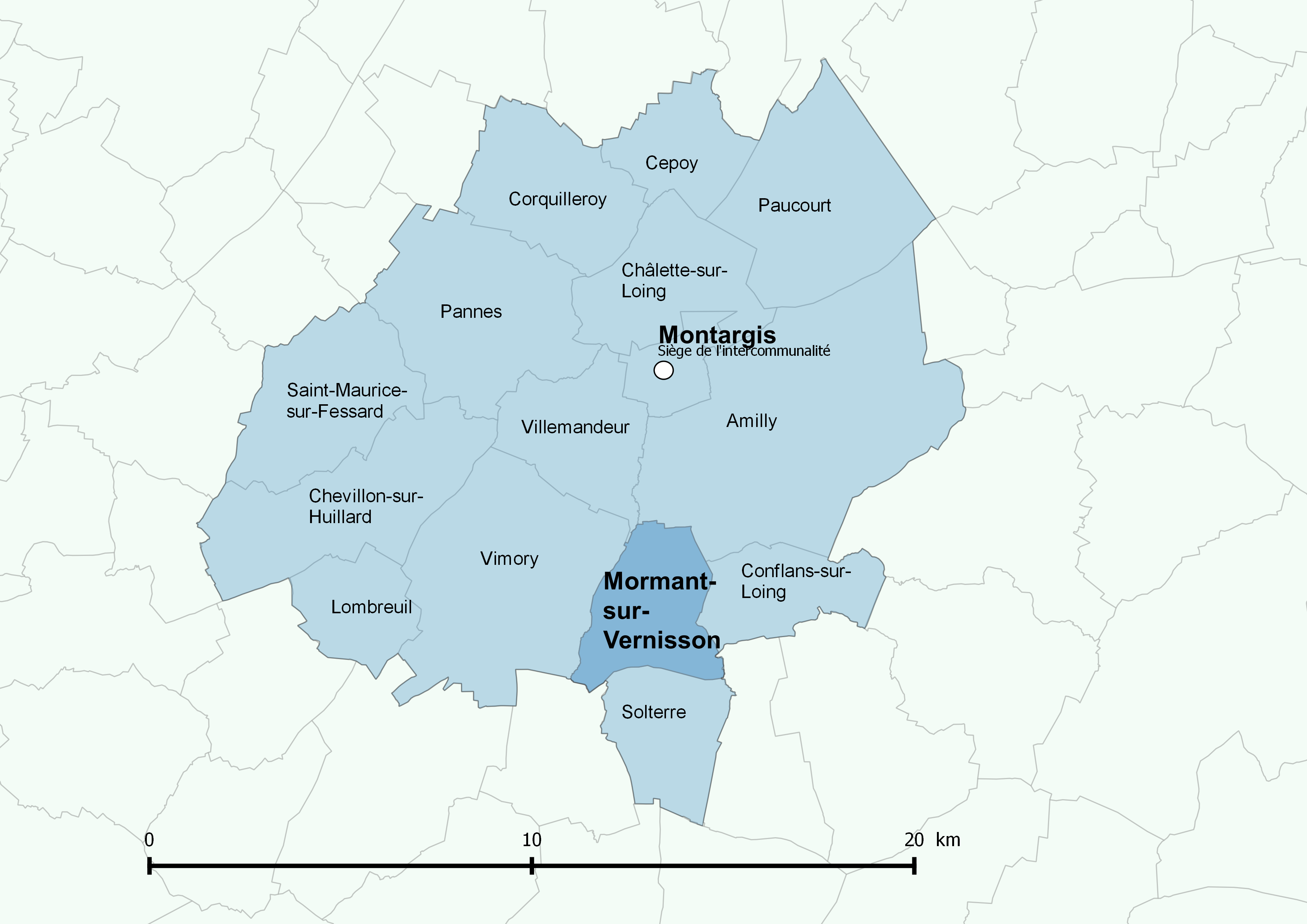 Périmètre de l'Agglomération montargoise et rives du Loing - Positionnement de la commune de Mormant-sur-Vernisson